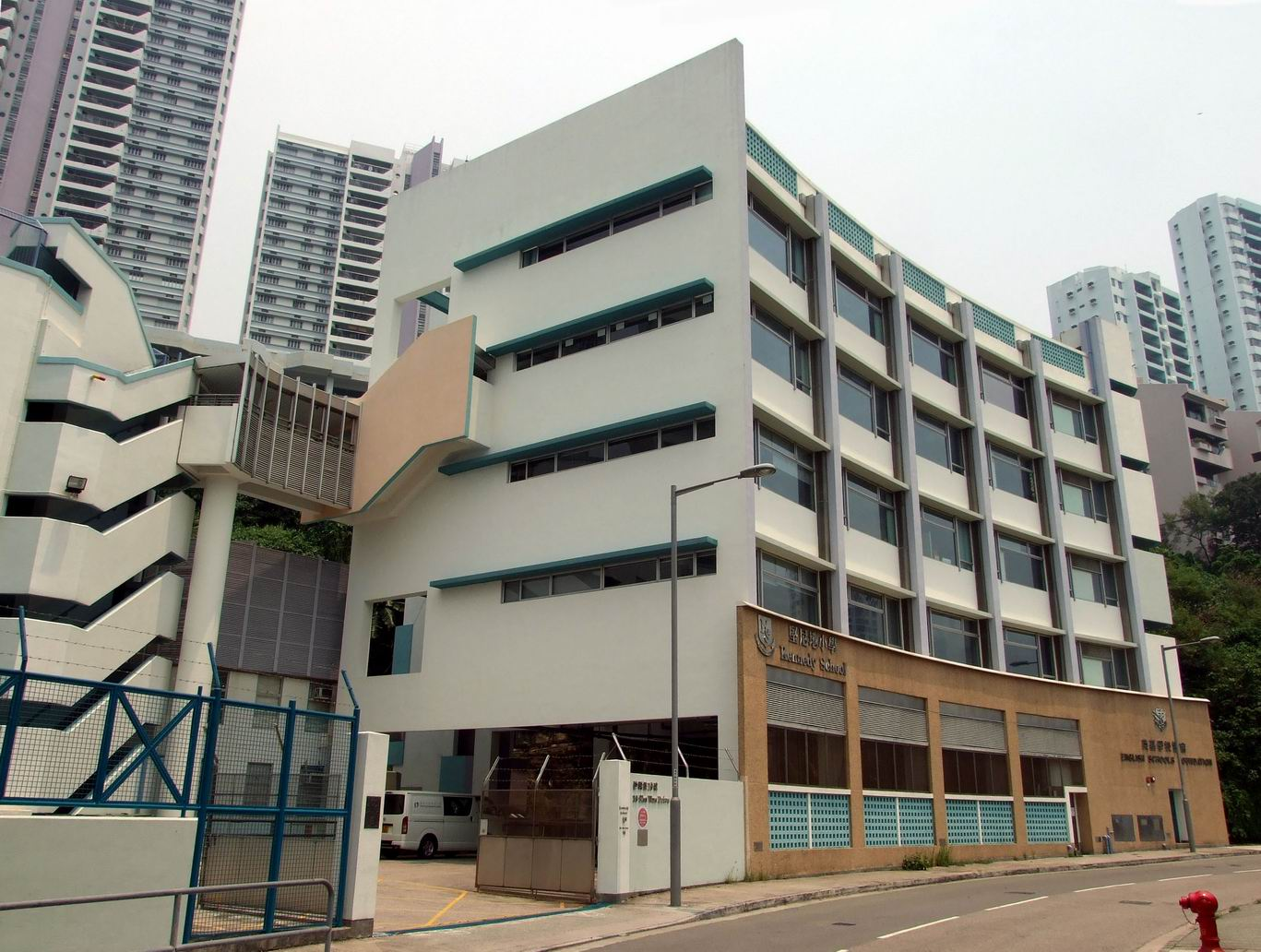 堅尼地小學